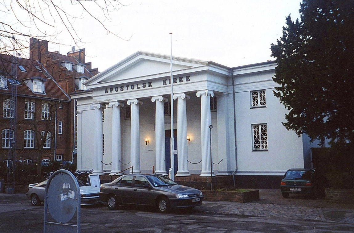 Apostolsk Kirke på Frederiksberg, Frederiksberg Kommune